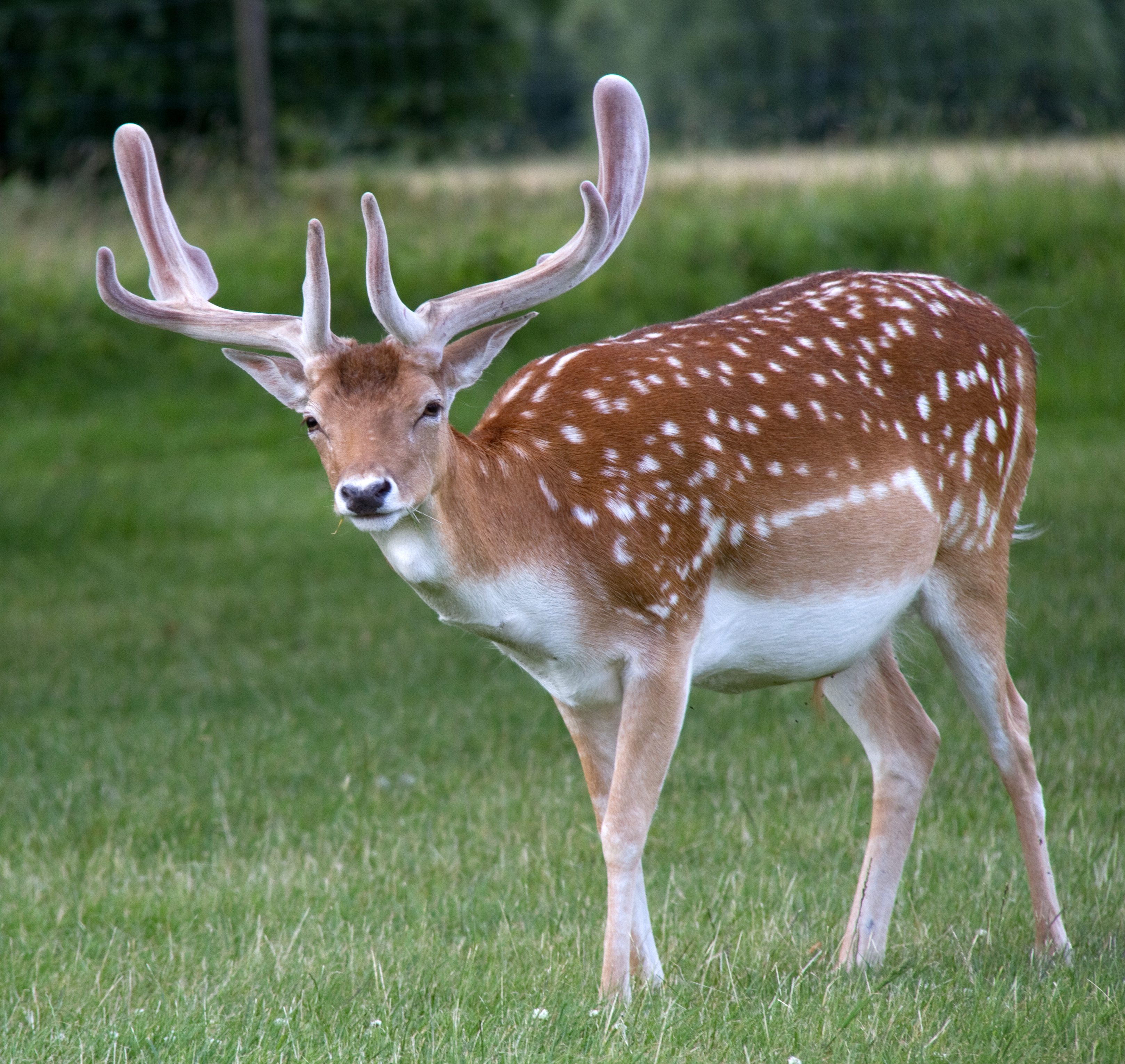 Fallow Deer